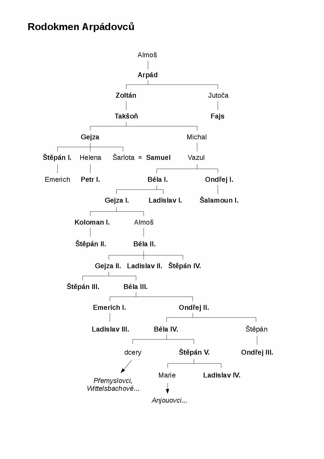 Rodokmen Arpádovců (v češtině)